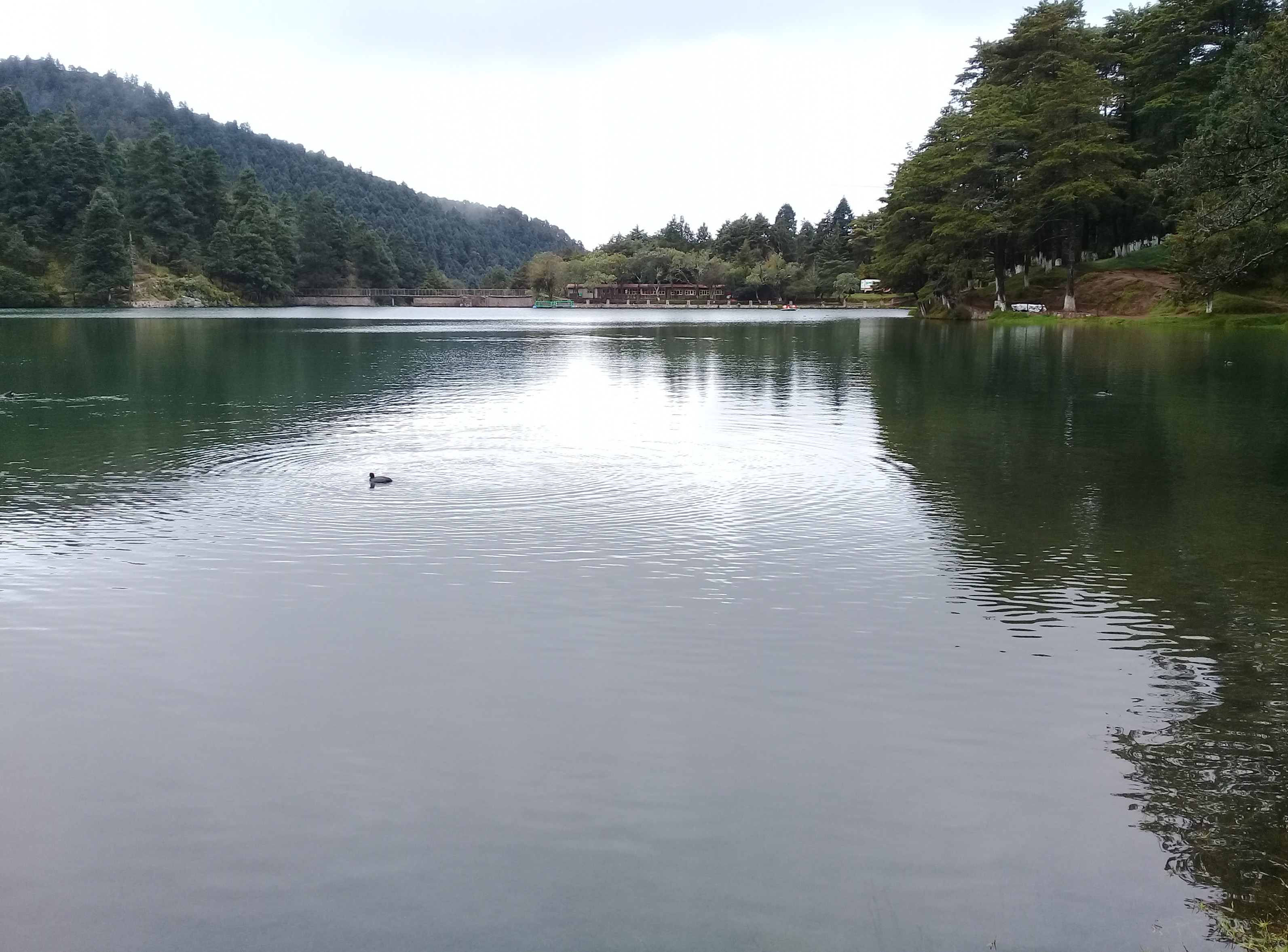 Lago artificiale presso la diga El Cedral in località La Estanzuela, nel comune di Mineral del Chico, nello Stato di Hidalgo in Messico.